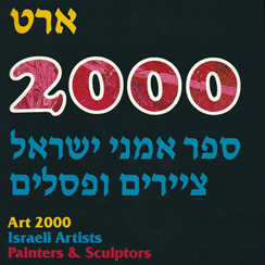 כריכת ארט 2000